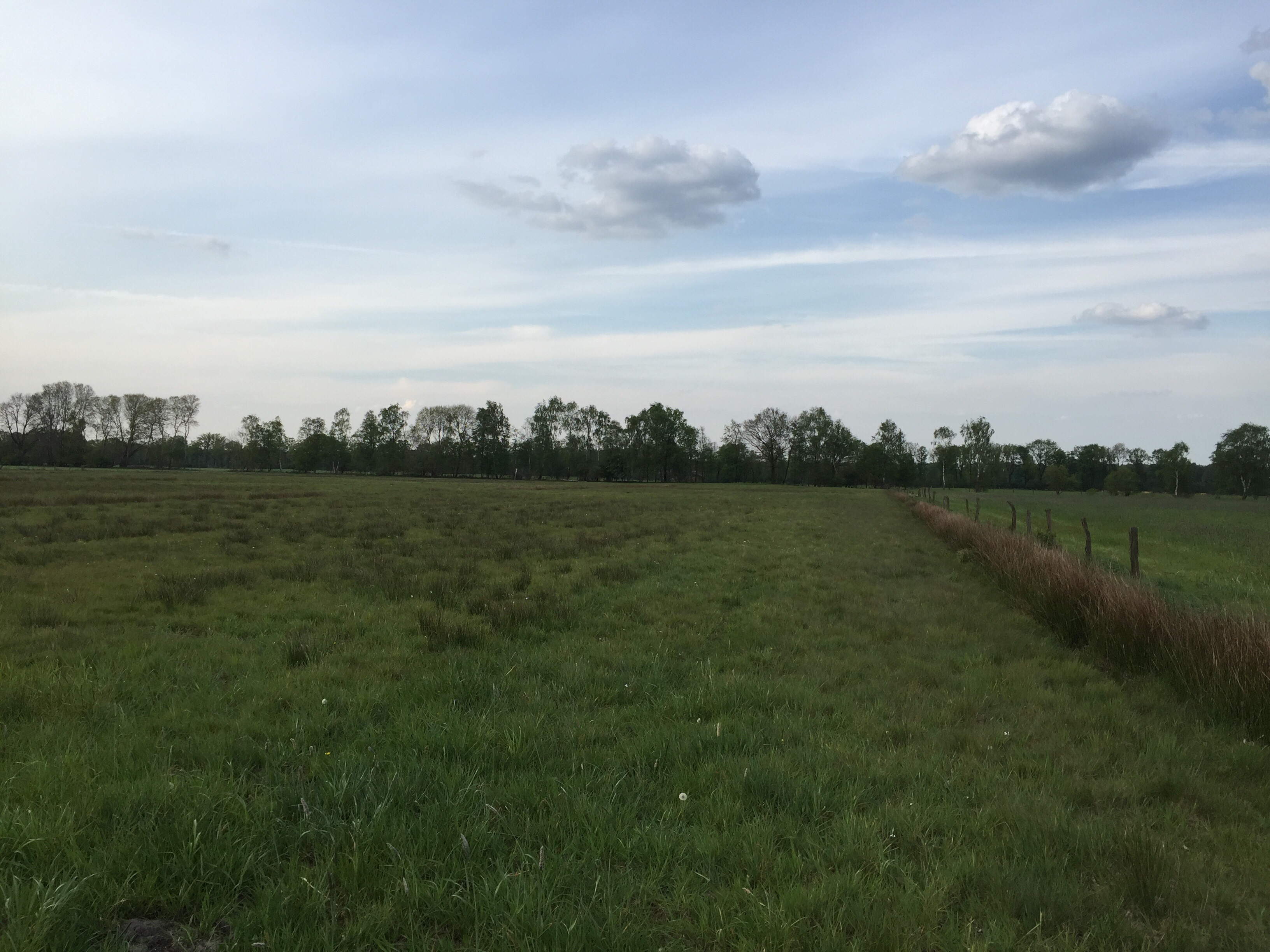 NSG Suddenmoor/Anten: Wiese/Weide im Suddenmoor mit Wallhecke am Horizont.